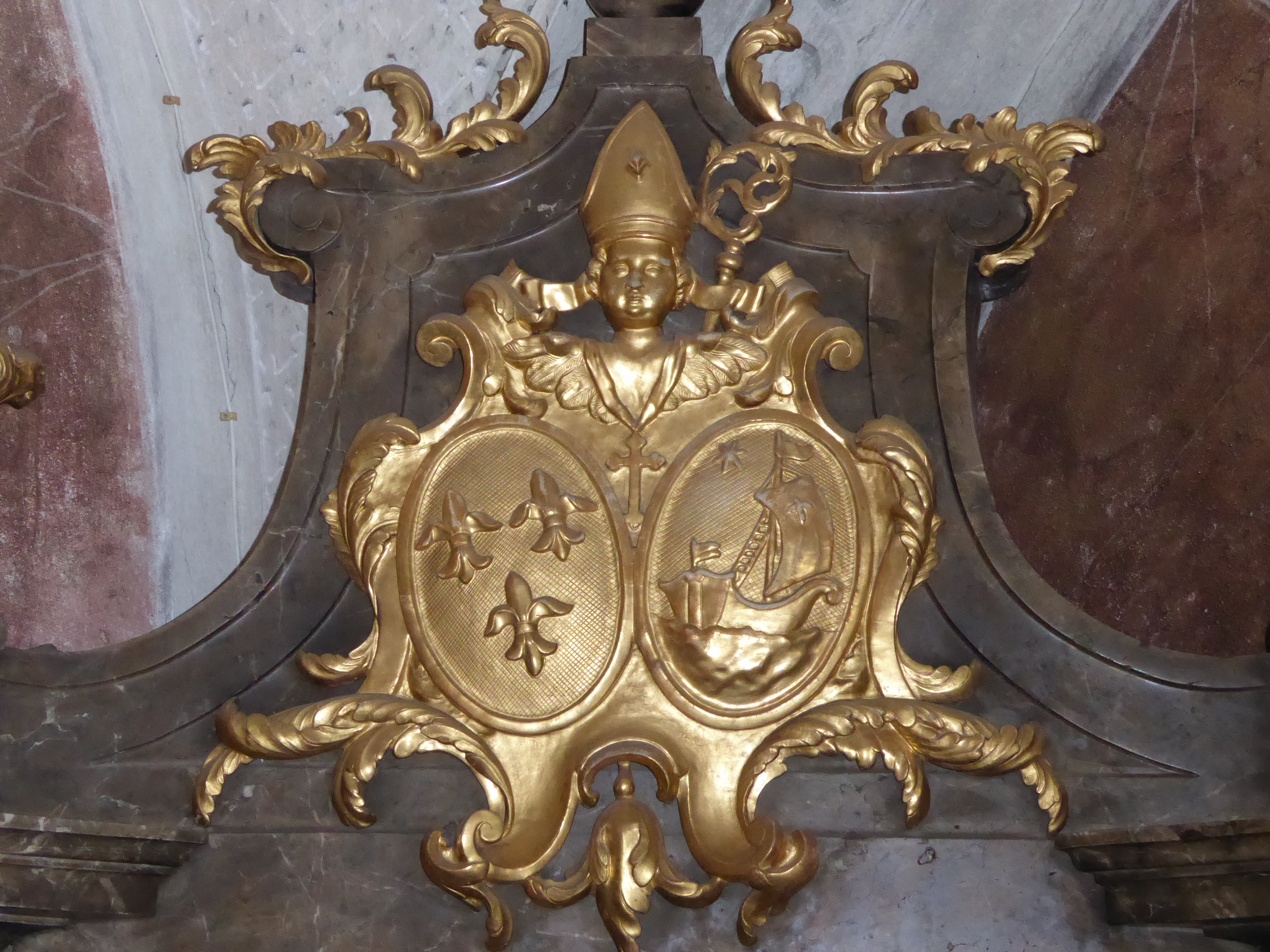 Pfarr- und Wallfahrtskirche Mariae Geburt, Maria Langegg 1, Bergern im Dunkelsteinerwald, Niederösterreich - Wappen von Abt Dominik Peckenstorfer, Stift Lilienfeld, auf einem Lavabo in der Sakristei